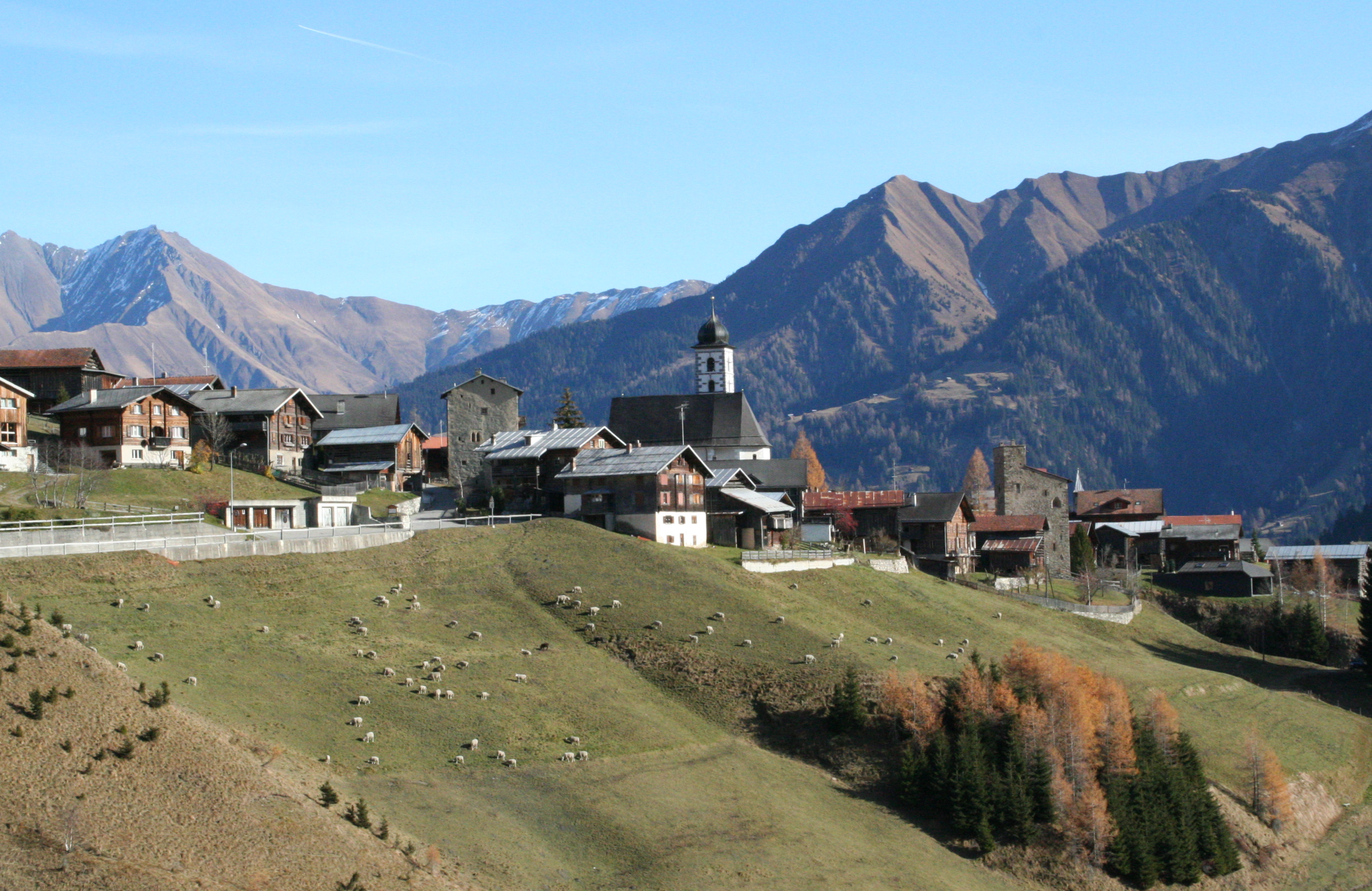 Lumbrein Ansicht von Westen